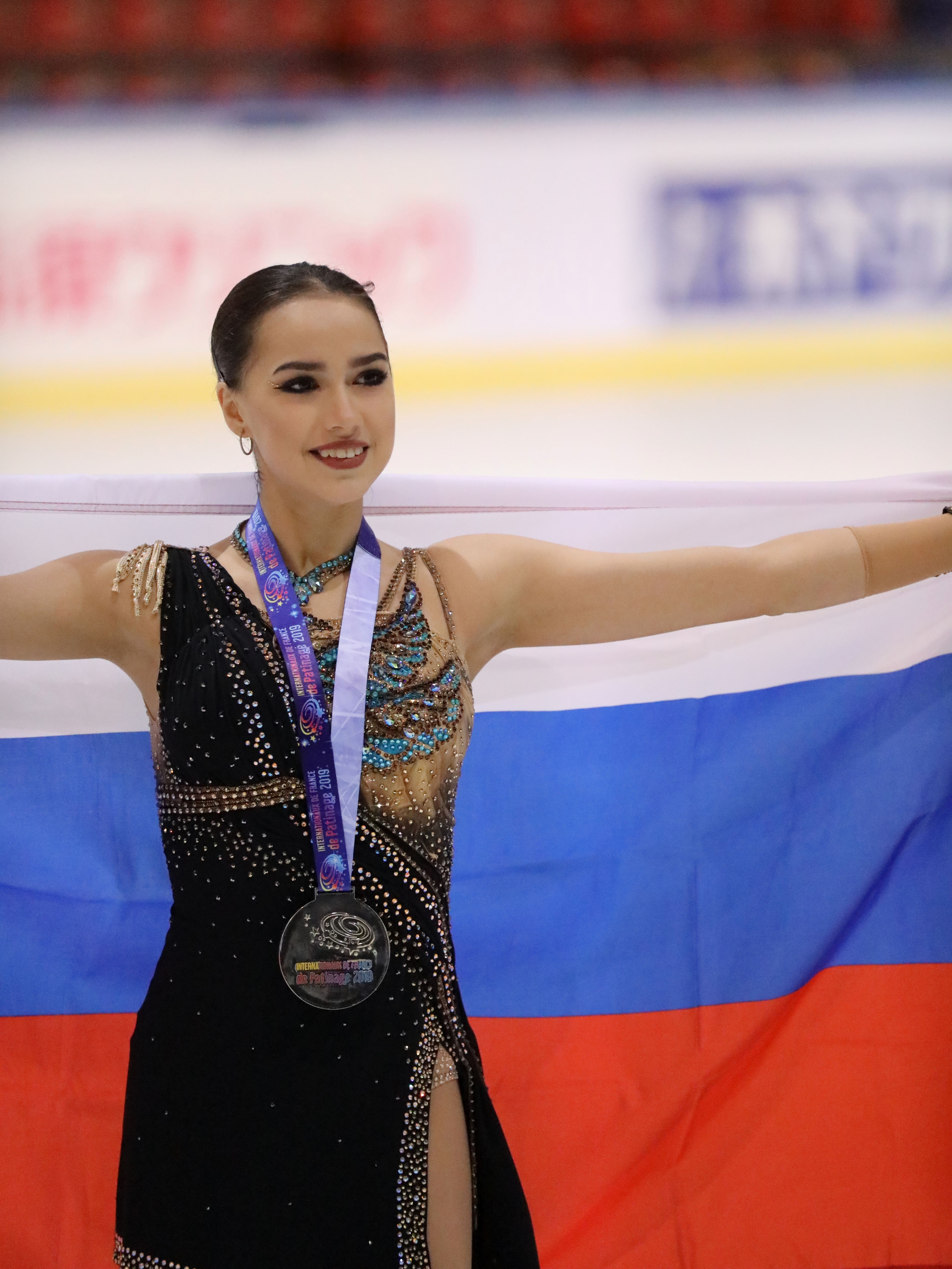 Internationaux de France 2019